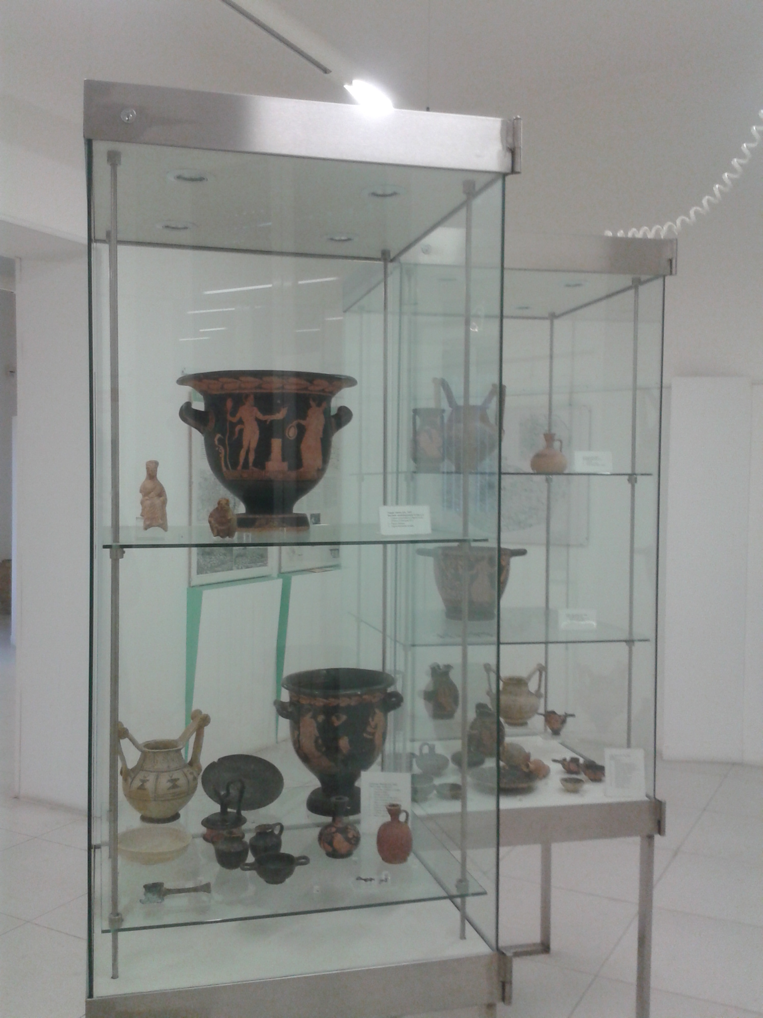 Parte della mostra "Messapica Ceglie". Nella foto vari reperti di ceramica Messapica (trozzelle, crateri, vasi e statuine) ritrovati nel territorio di Ceglie Messapica e conservati nel locale centro di documentazione archeologica.